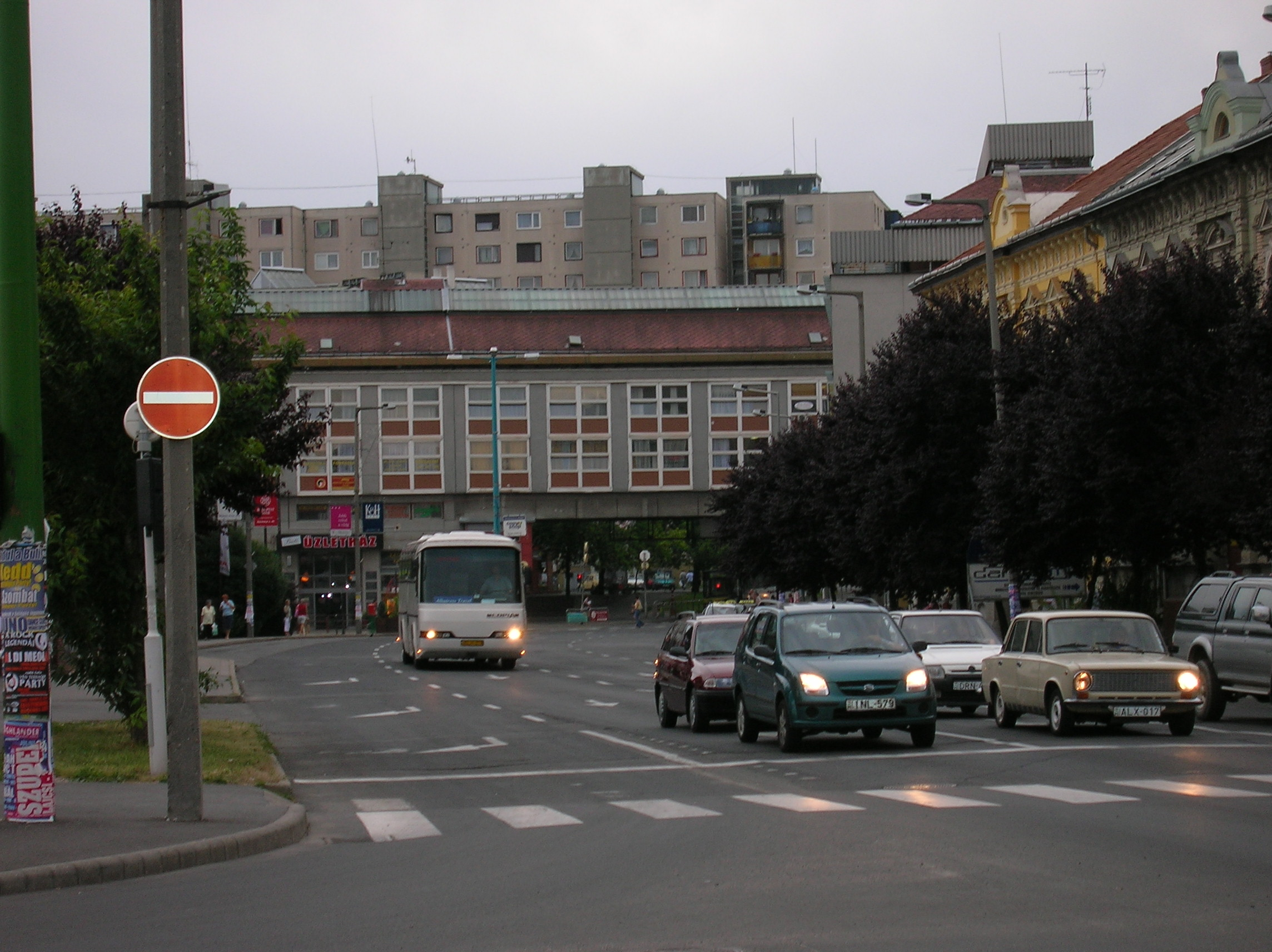 Miskolc, Downtown